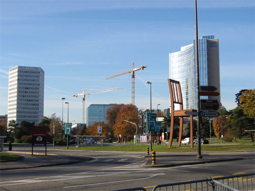 Genf, internationales Quartier